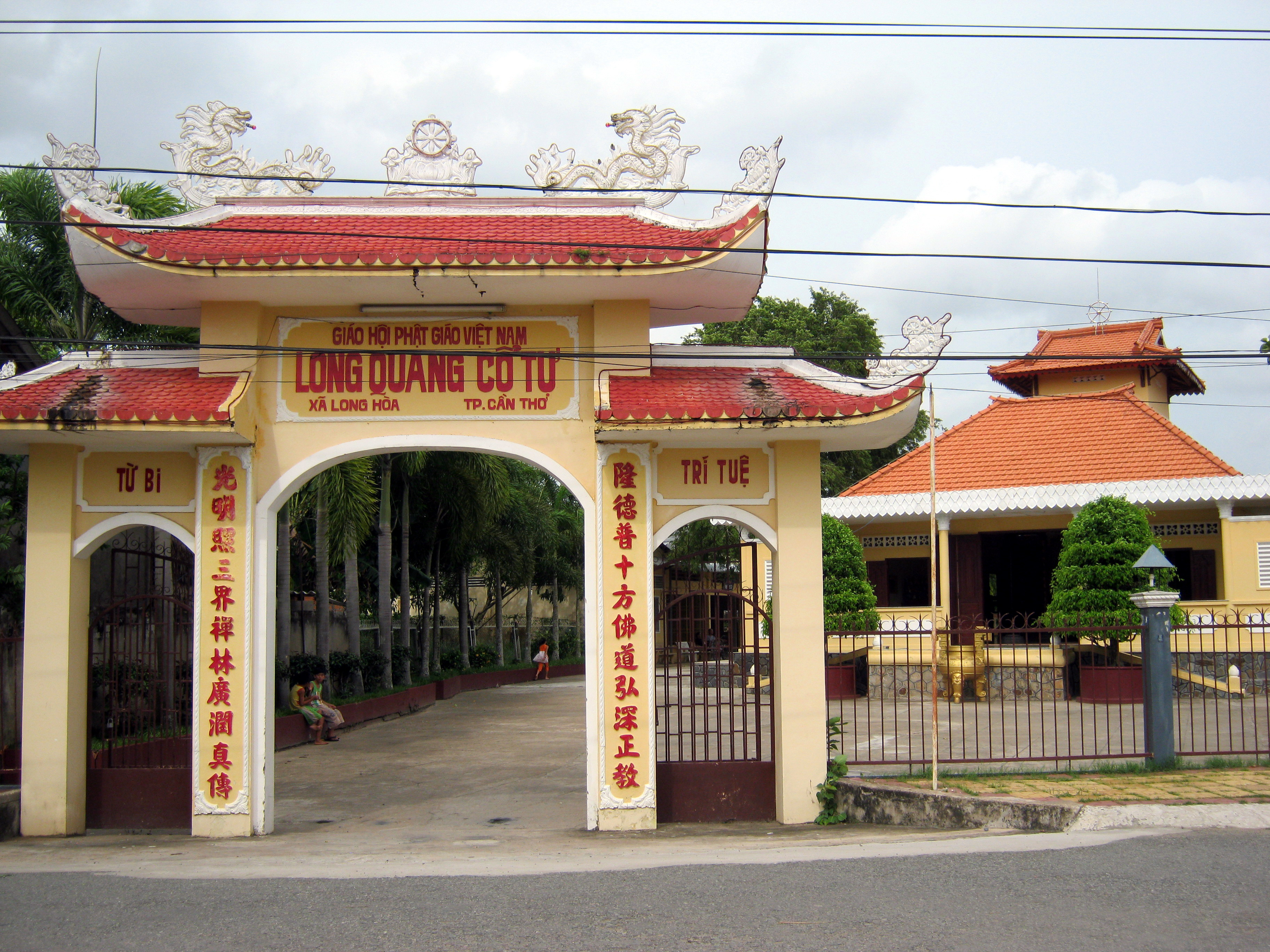 Cổng chùa Long Quang ở thành phố Cần Thơ, Việt Nam.